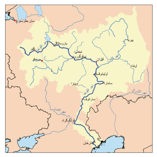 خارطة تُبيِّن مسار نهر الڤولغا.